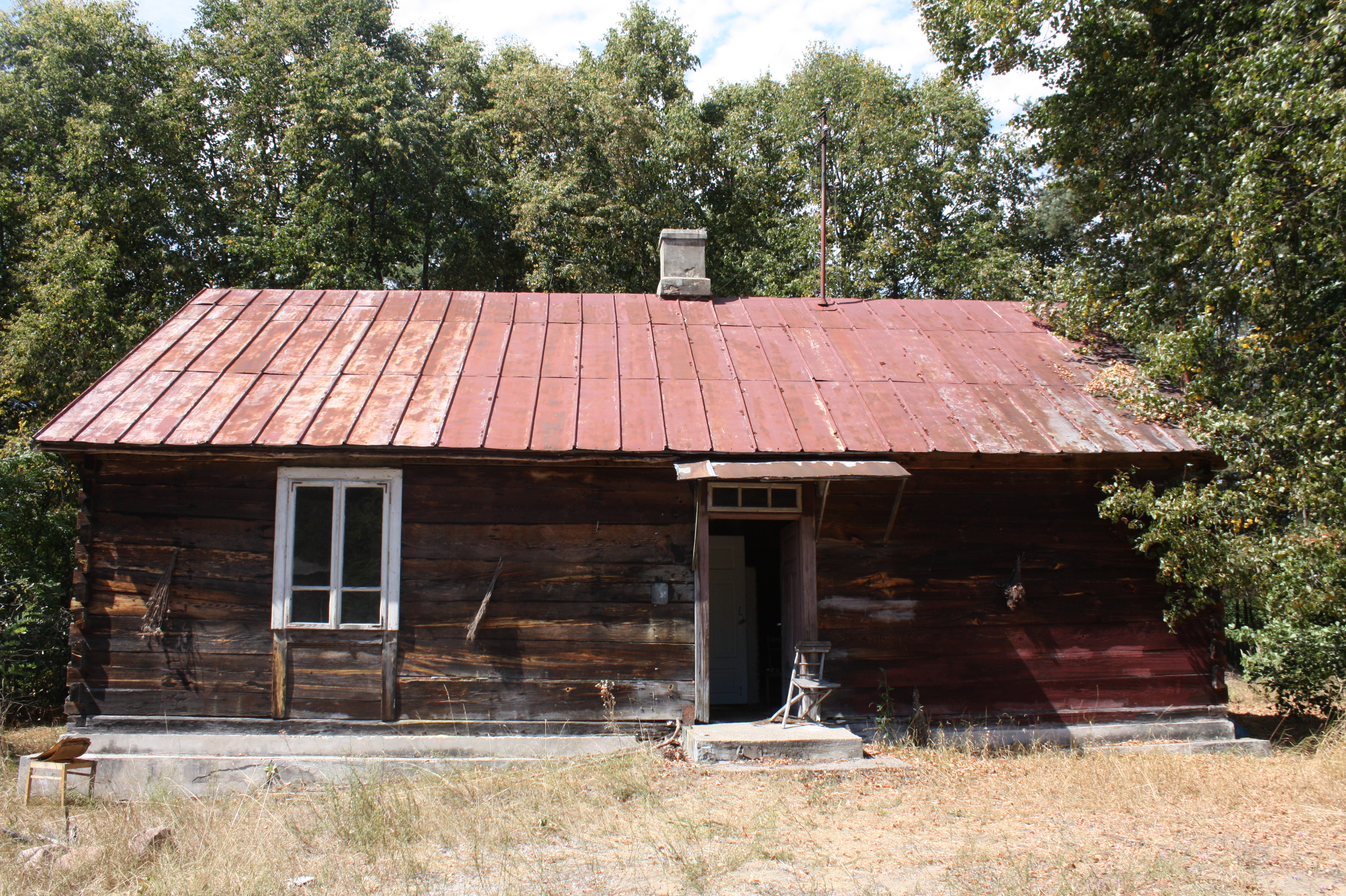 Jeruzal, Dom wilkowyjskiej Babki - zielarki